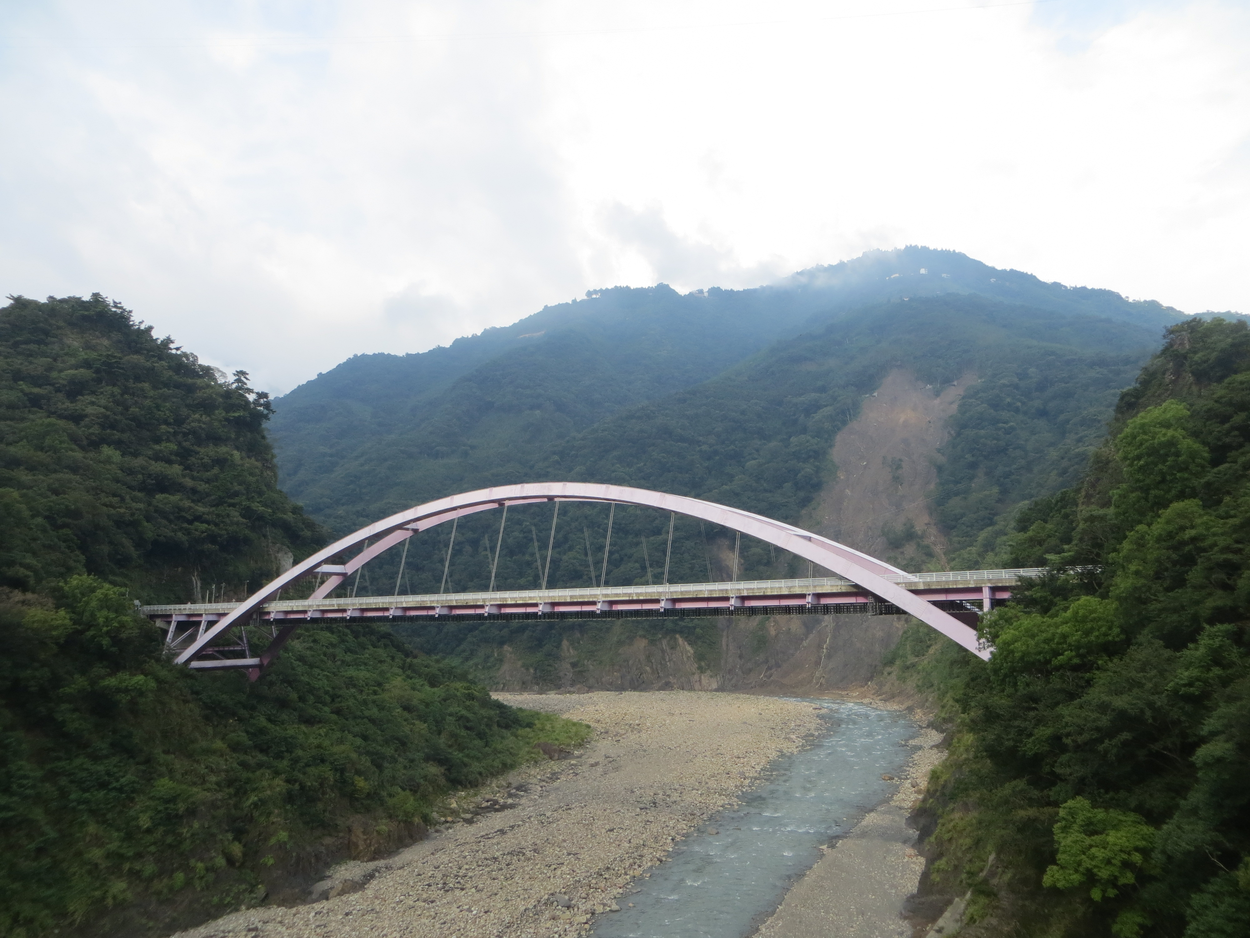 2014年8月12日，自舊巴陵橋眺望巴陵大橋側面。為中承式鋼拱橋。